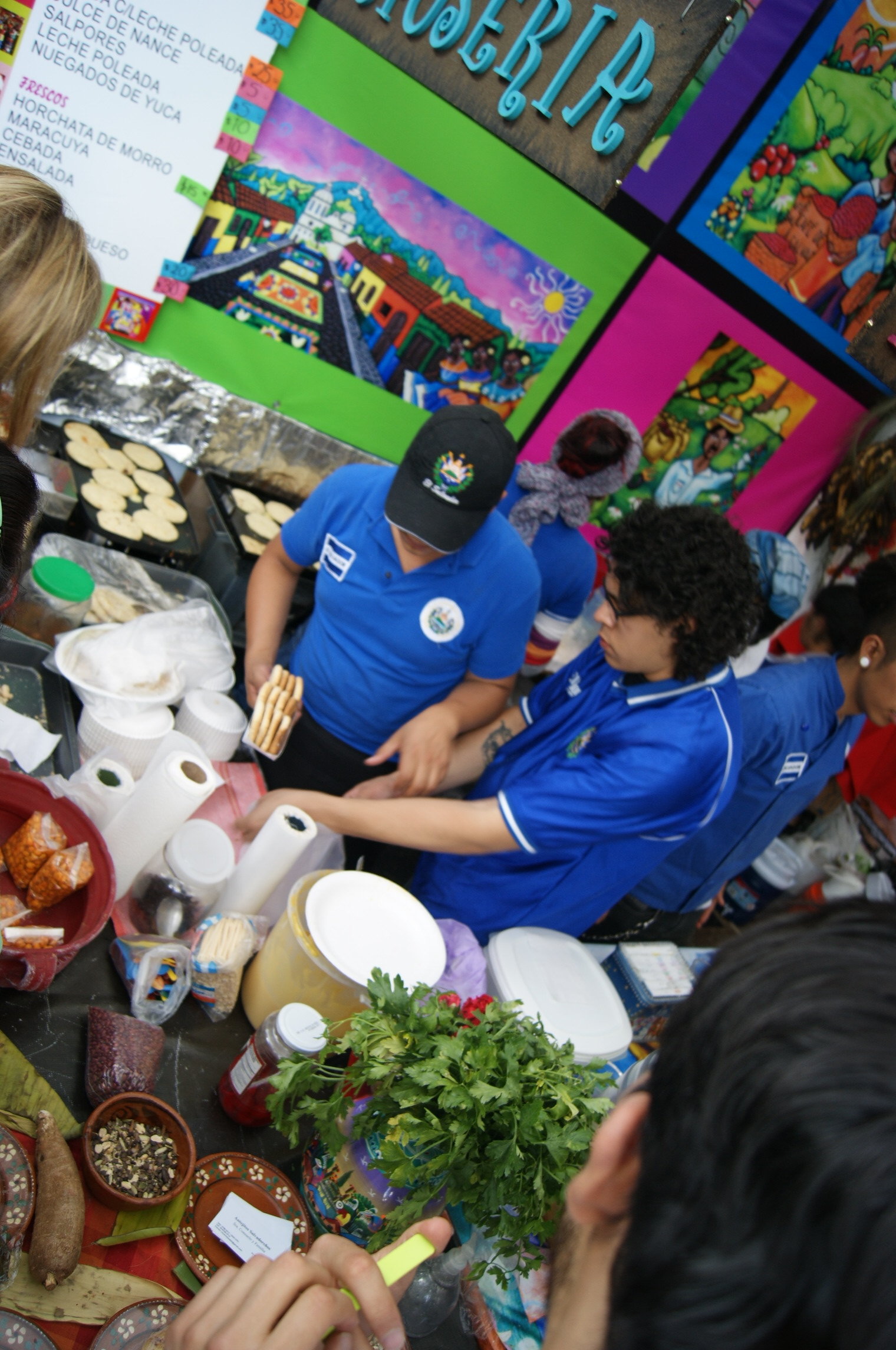 Feria de de las Culturas Amigas Ciudad de México, DF, 2013